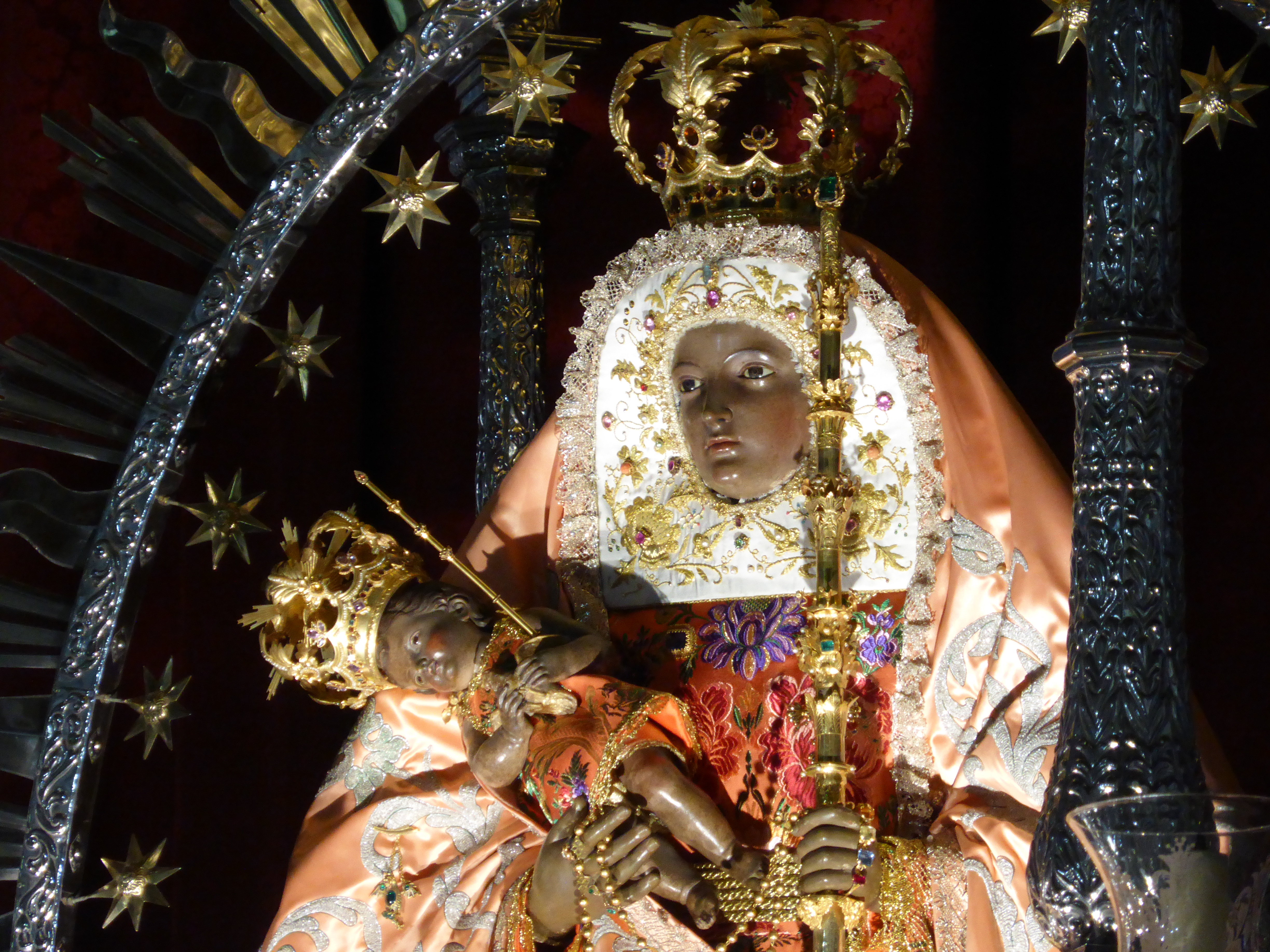 En el municipio de Candelaria (isla de Tenerife) se encuentra la basílica y santuario católico de la Virgen de Candelaria, o "Nuestra Señora de la Candelaria". La imagen actual está fechada en 1827-1828, y es de estilo neoclásico, sustituyendo la talla medieval gótica que se llevó una riada en el año 1826. Es Patrona de Canarias. Aquí la imagen está en un trono procesional repujado en plata. Y viste uno de sus cerca de 30 mantos, usados en distintos festejos y tiempos litúgicos.